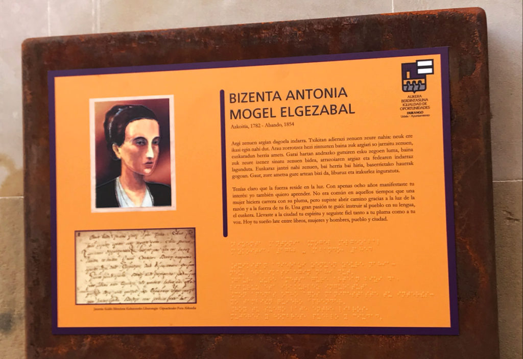 Placa dedicada a Bizenta Mogel de la Biblioteca de Durango.